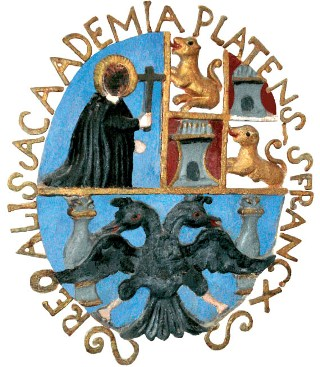 Escudo antiguo e la Universidad de Chuquisaca